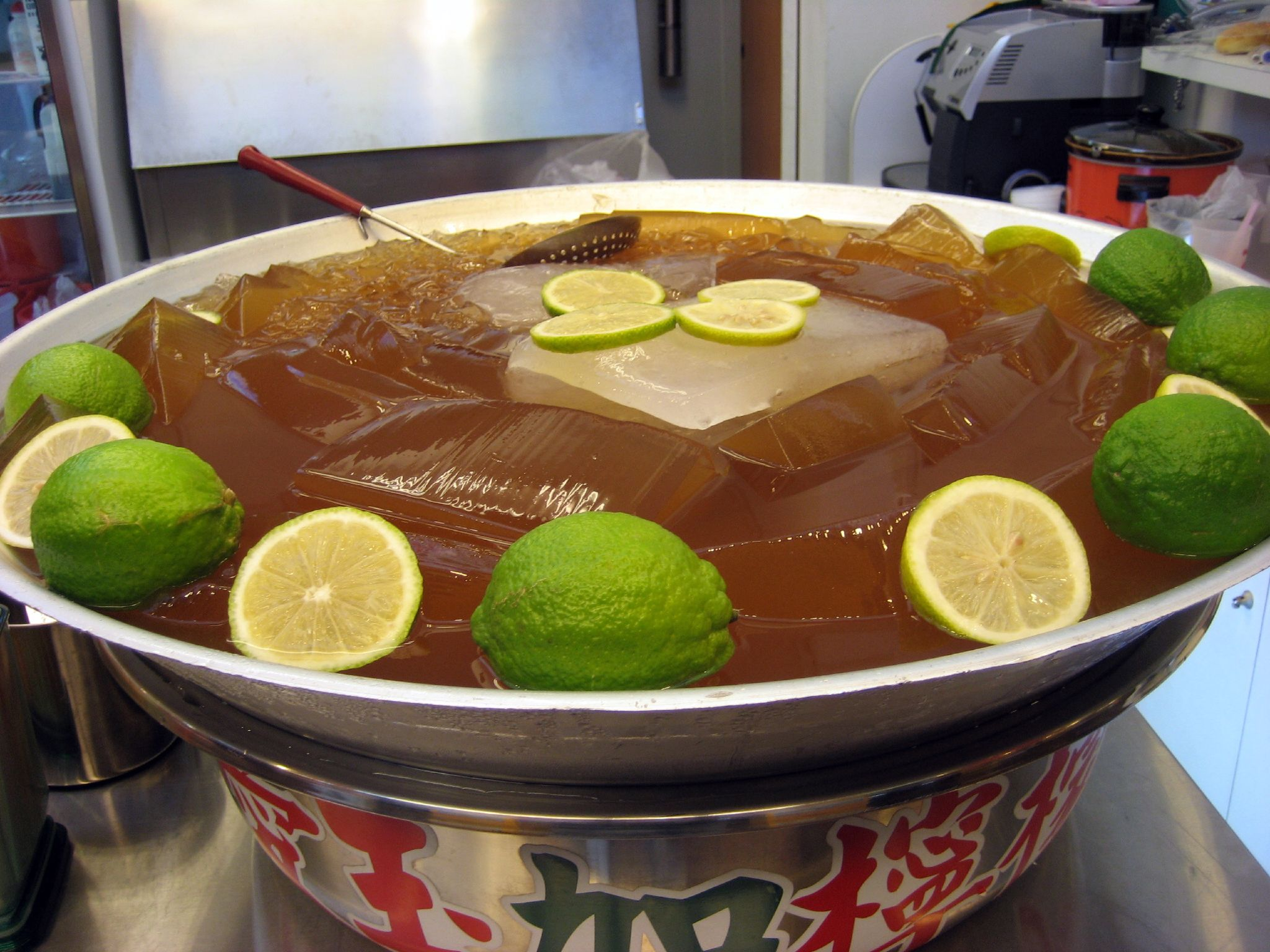 tea ( 愛玉)